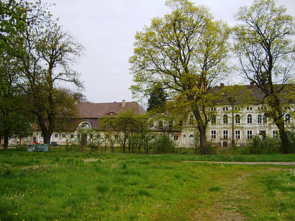 Zdjęcie pałacu w Cecenowie